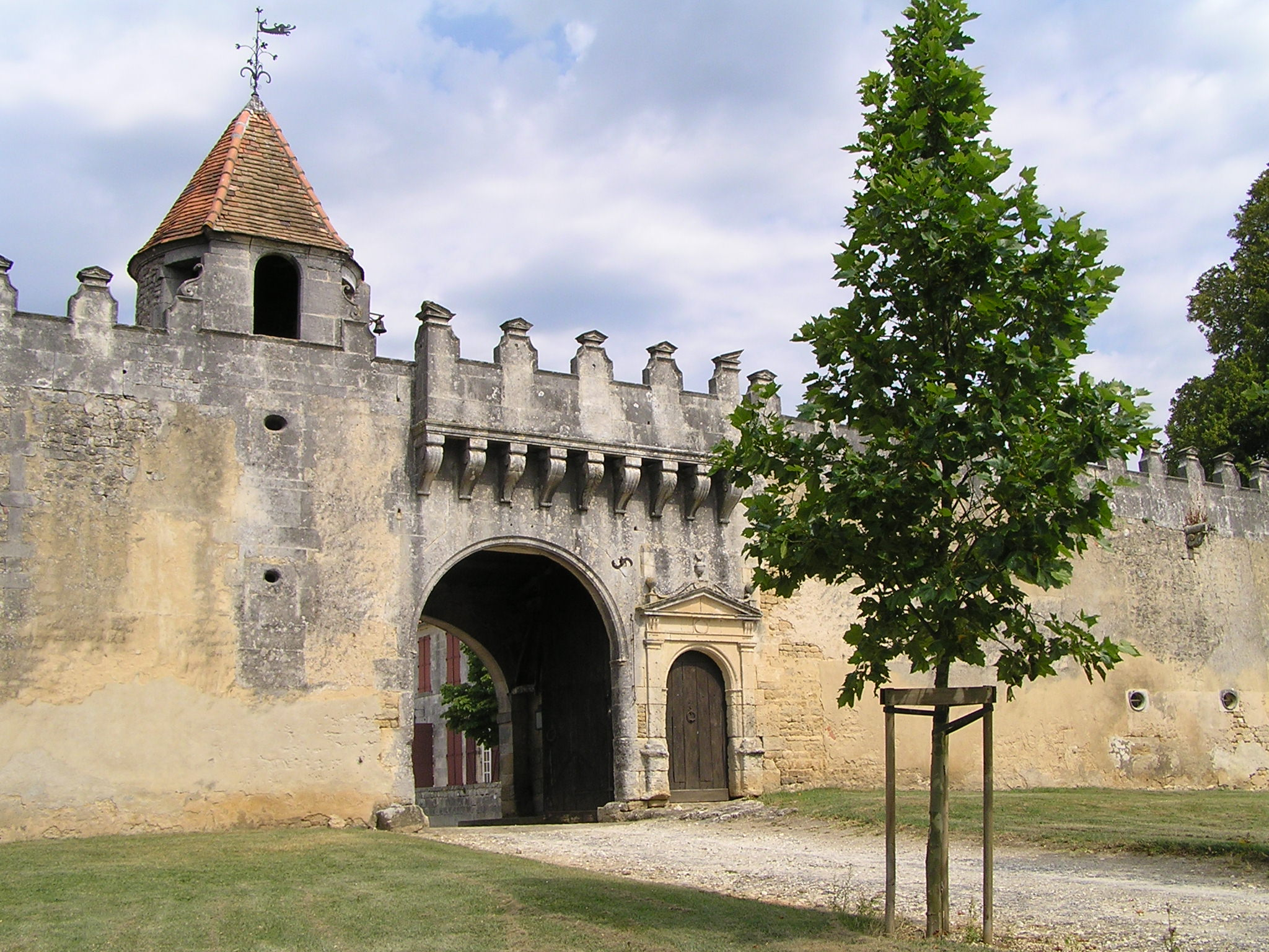 château de garde-épée, à Saint-Brice